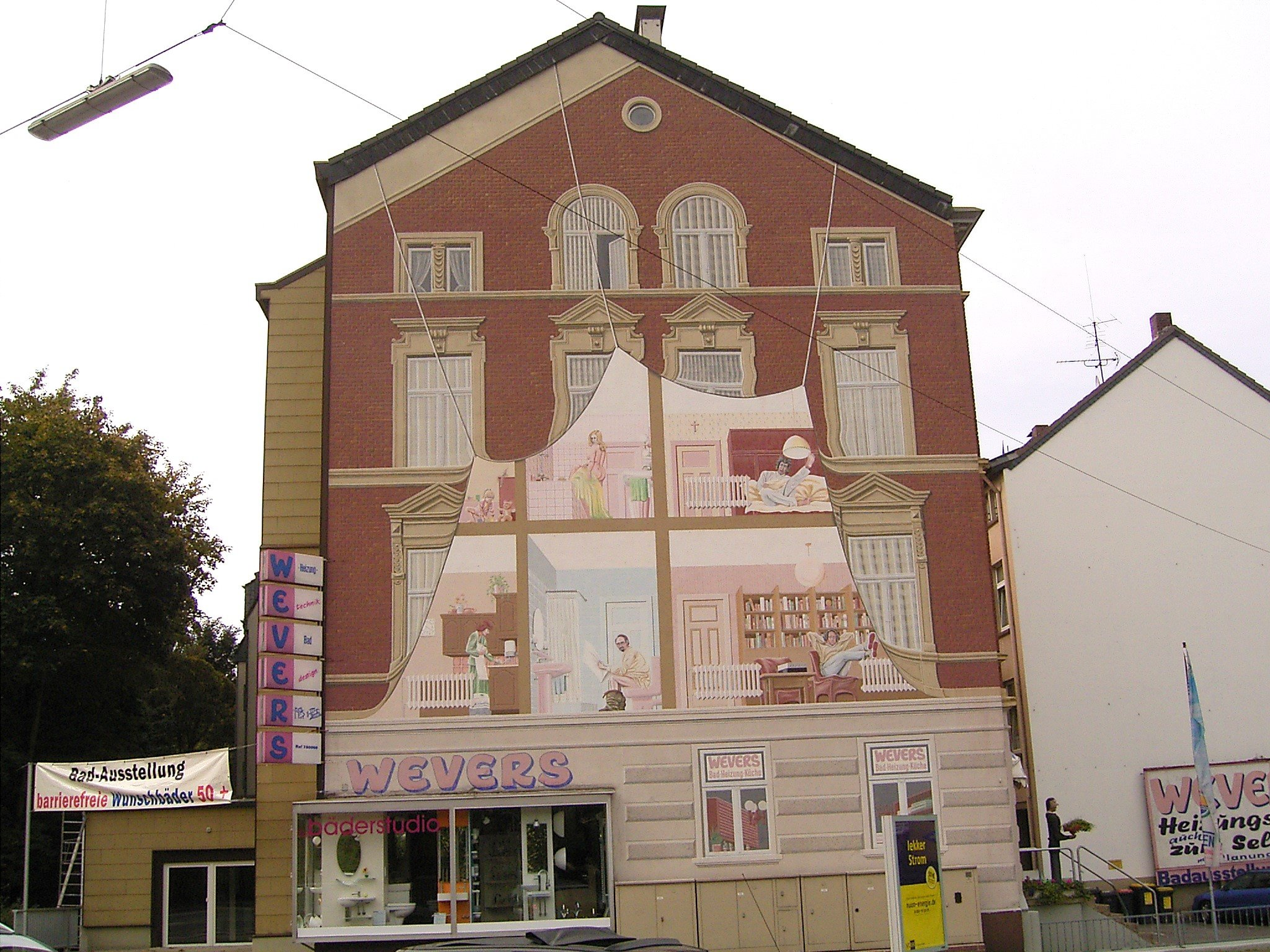 Wuppertal